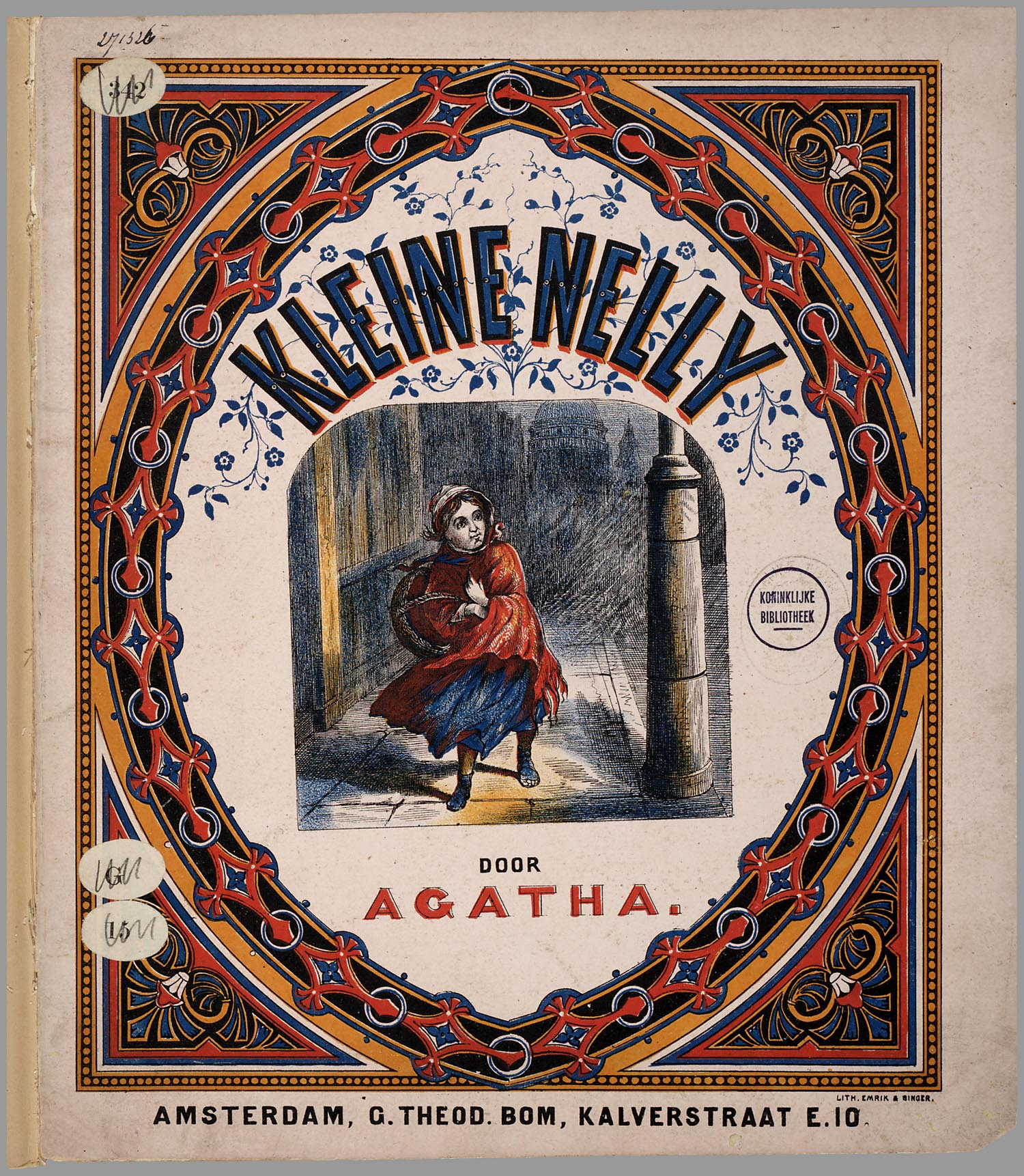 Oorspronkelijk Engels 'toy book' met op de voorkant een gekleurde geometrische sierrand rondom een afbeeldIngekleurd De 8-jarige Nelly heeft het niet gemakkelijk: haar moeder ligt in het kraambed en haar vader in het ziekenhuis. Zij gaat waterkers verkopen in de straten van Londen, zorgt voor haar moeder en zoekt haar vader op. Een rijke heer helpt het gezin omdat Nelly zo goed haar best doet. Vier van de platen zijn paginagroot, op twee bladen staan elk 2 afbeeldingen. 6 bl. 6 bl. pl : gekl. lith // De keerzijde der bladen is onbedrukt // Titel op de eerste tekstpagina: Kleine Nelly, een ware gebeurtenis // Datering: niet in Brinkman, in Lust en Leering gedateerd op 1865 Londen // Armoede // Prentenboeken // Deugdverhalen